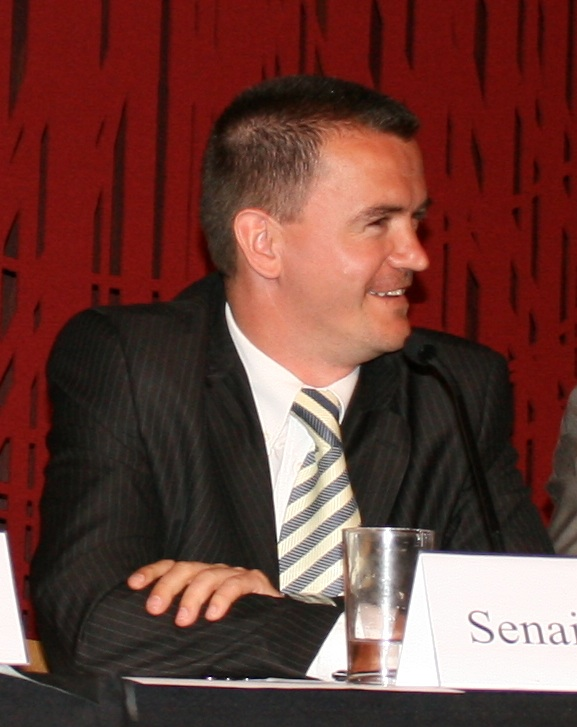 Senaid Kobilica på Dialogmøte om imamenes samfunnsansvar på Litteraturhuset